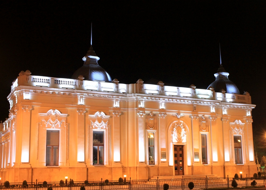 Кукольный театр.